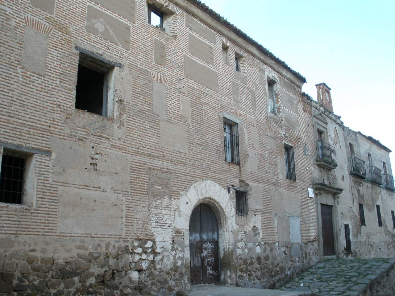 Antiguo Colegio de los Jesuitas en Oropesa (provincia de Toledo).